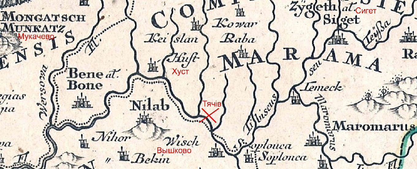 Джерело